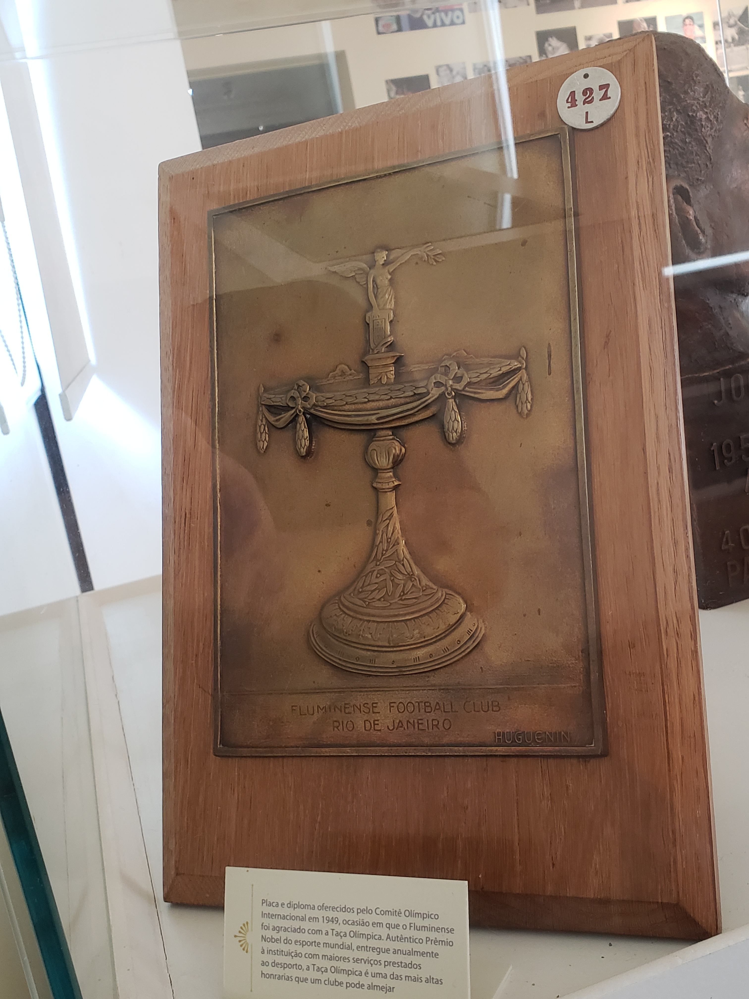 Placa concedida ao Fluminense Football Club pelo COI pela conquista da Taça Olímpica de 1949.